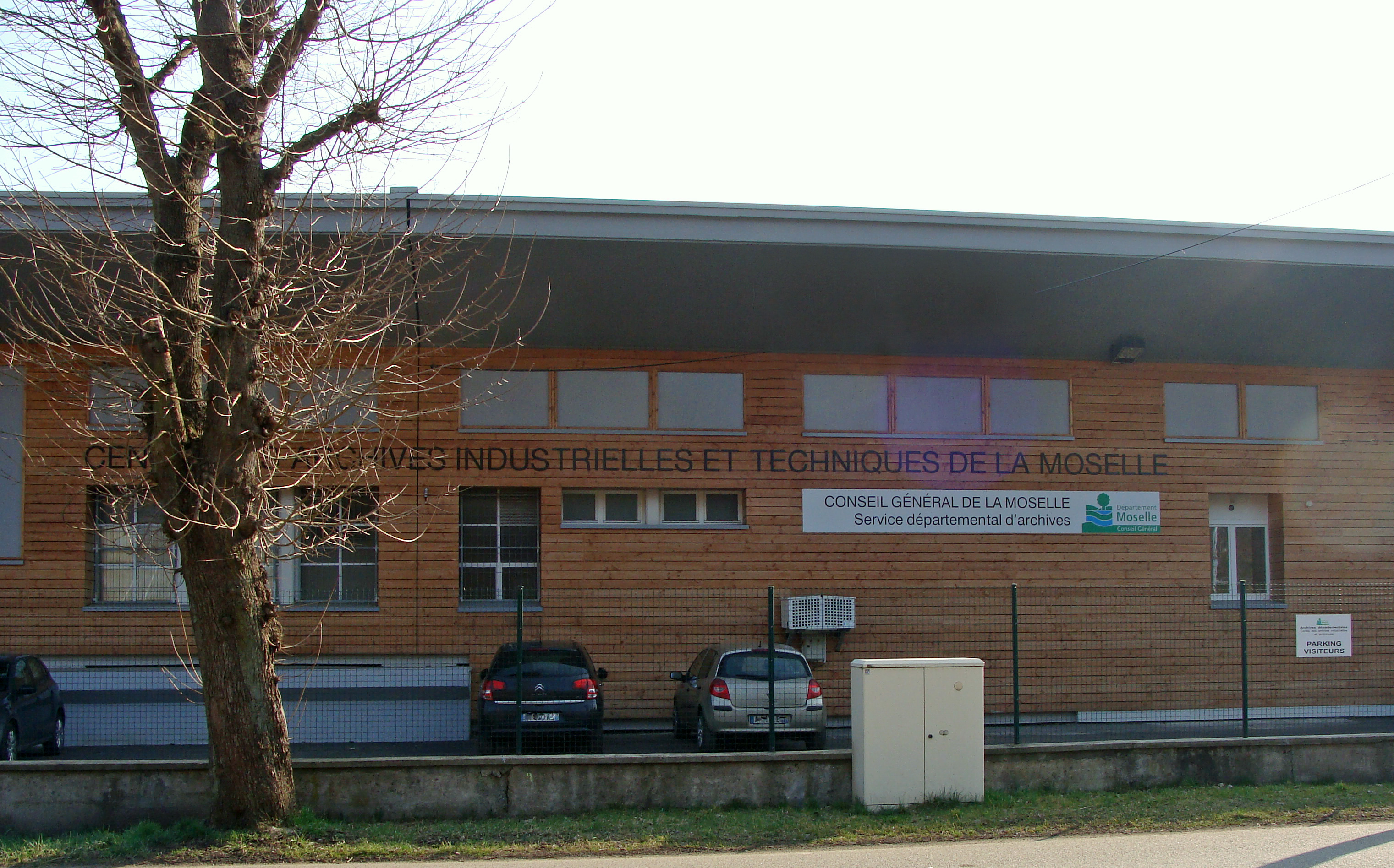 Centre des archives industrielles et techniques de la Moselle (CAITM), géré par le Conseil Général de la Moselle. Situation: rue du Merle à Saint-Avold. Bâtiment construit en 1948, à l'origine magasin de matériel minier des Houillères du Bassin de Lorraine (HBL).